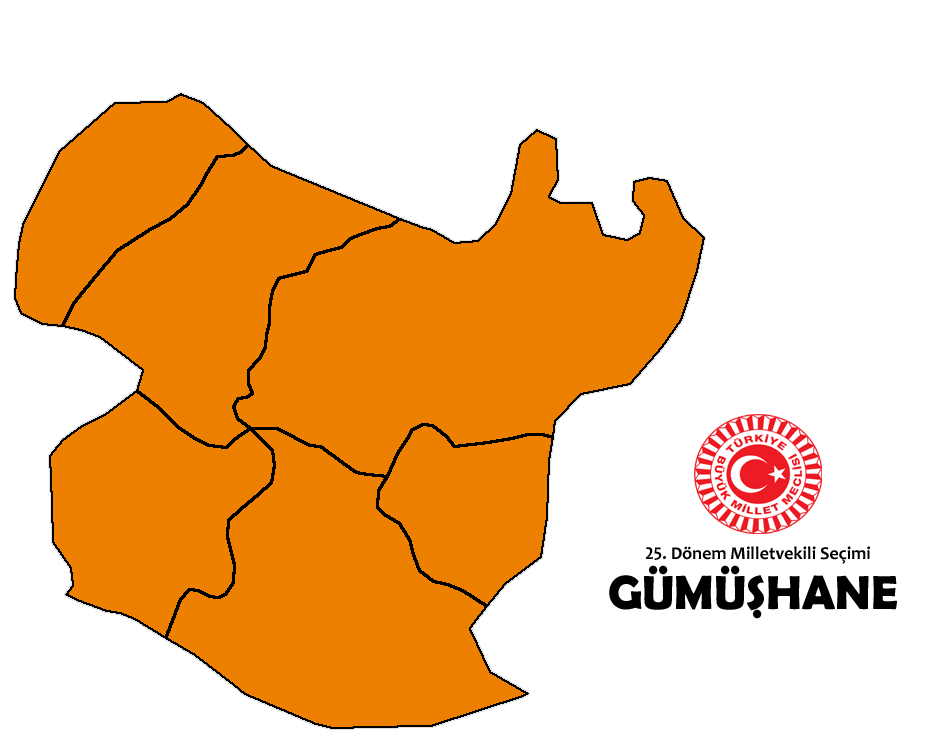 2015 genel seçim sonuçları